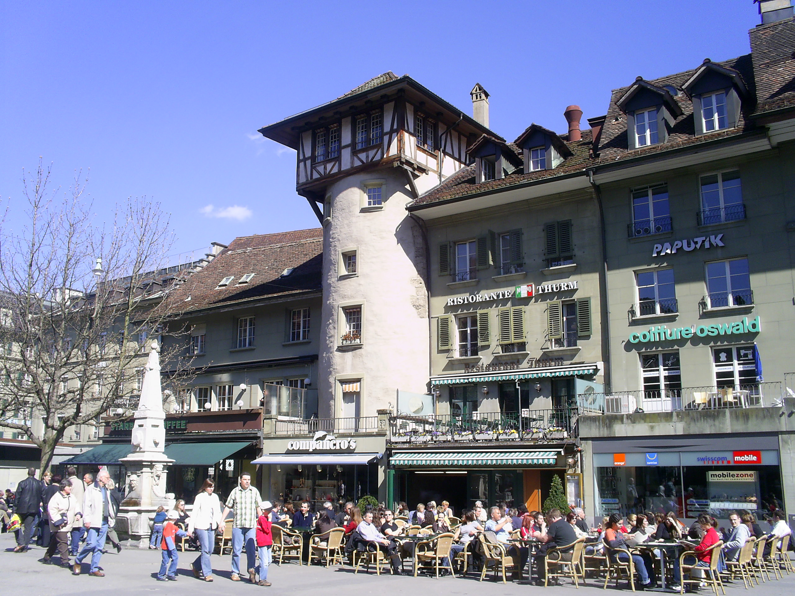 Torre del Holandés en Berna